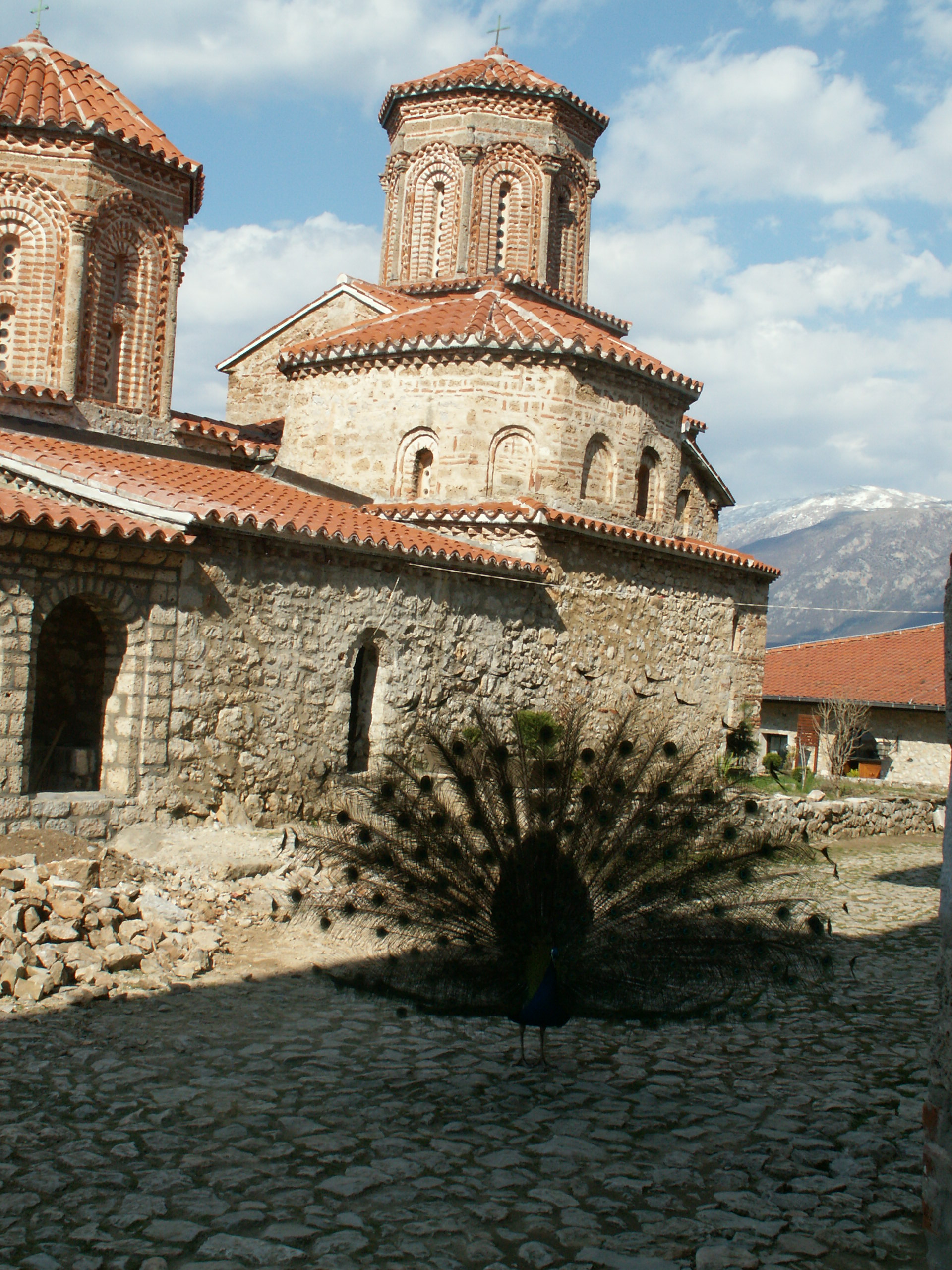 monastère Sveti Naum à Ohrid, mars 2008